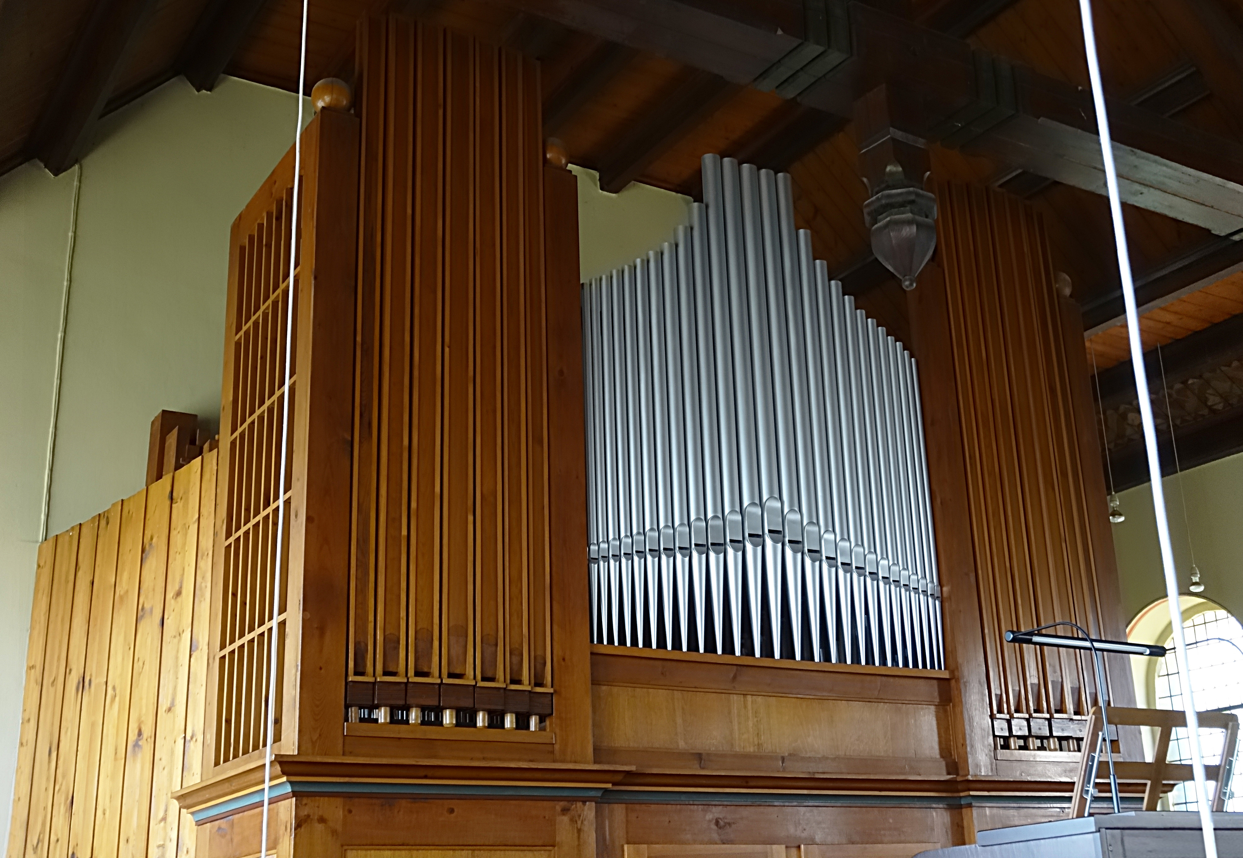 Die Orgel der Gustav-Adolf-Kirche (Erfurt) von Rudolf Böhm (1955, II/P 14) wurde 1985 von Schönefeld Orgelbau restauriert und 2010 von Bernhard Kutter umgebaut[1][2]